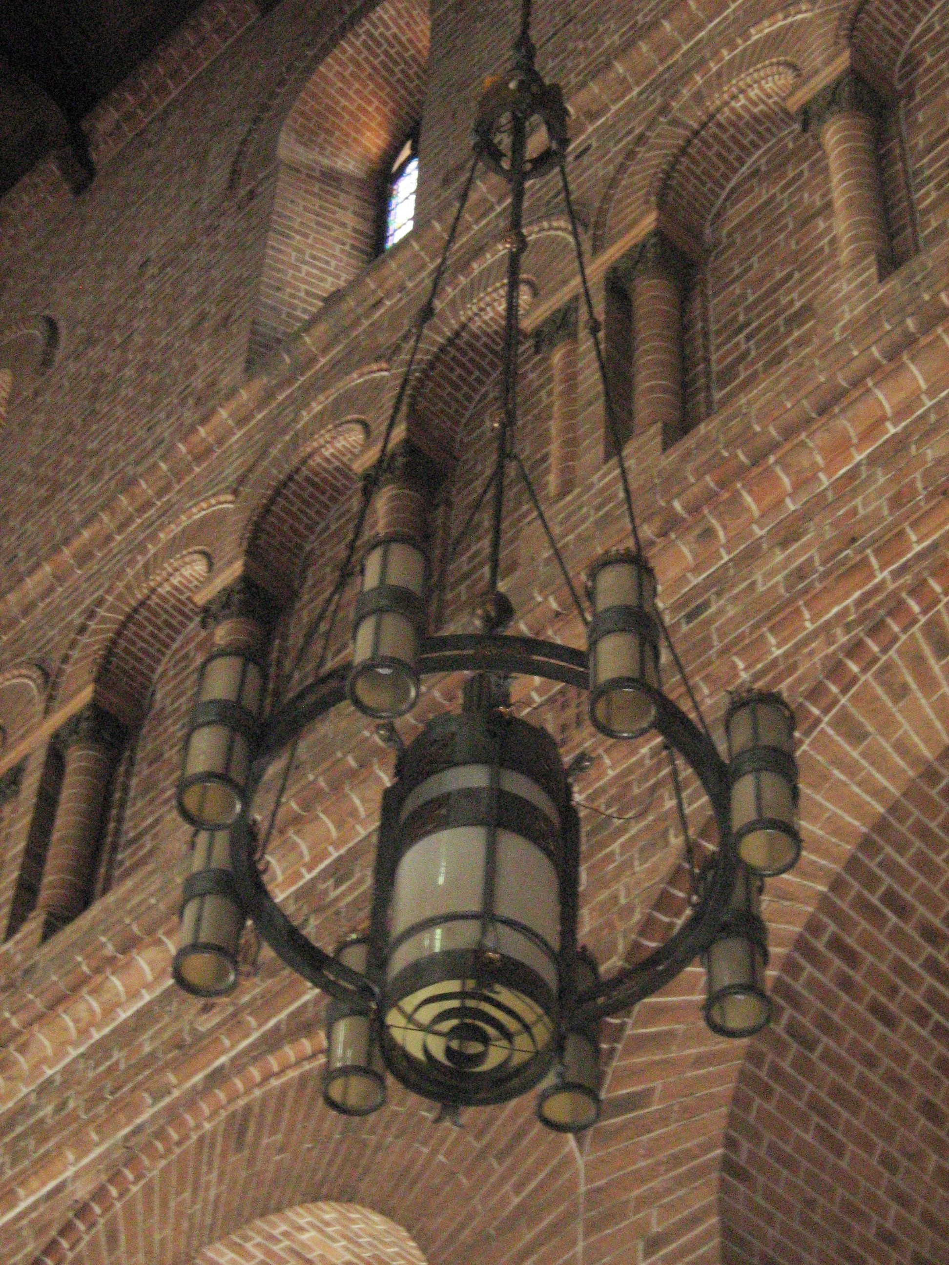 Lampara de la Catedral Metropolitana de Medellín, ubicada en la nave central. Medellín, Colombia